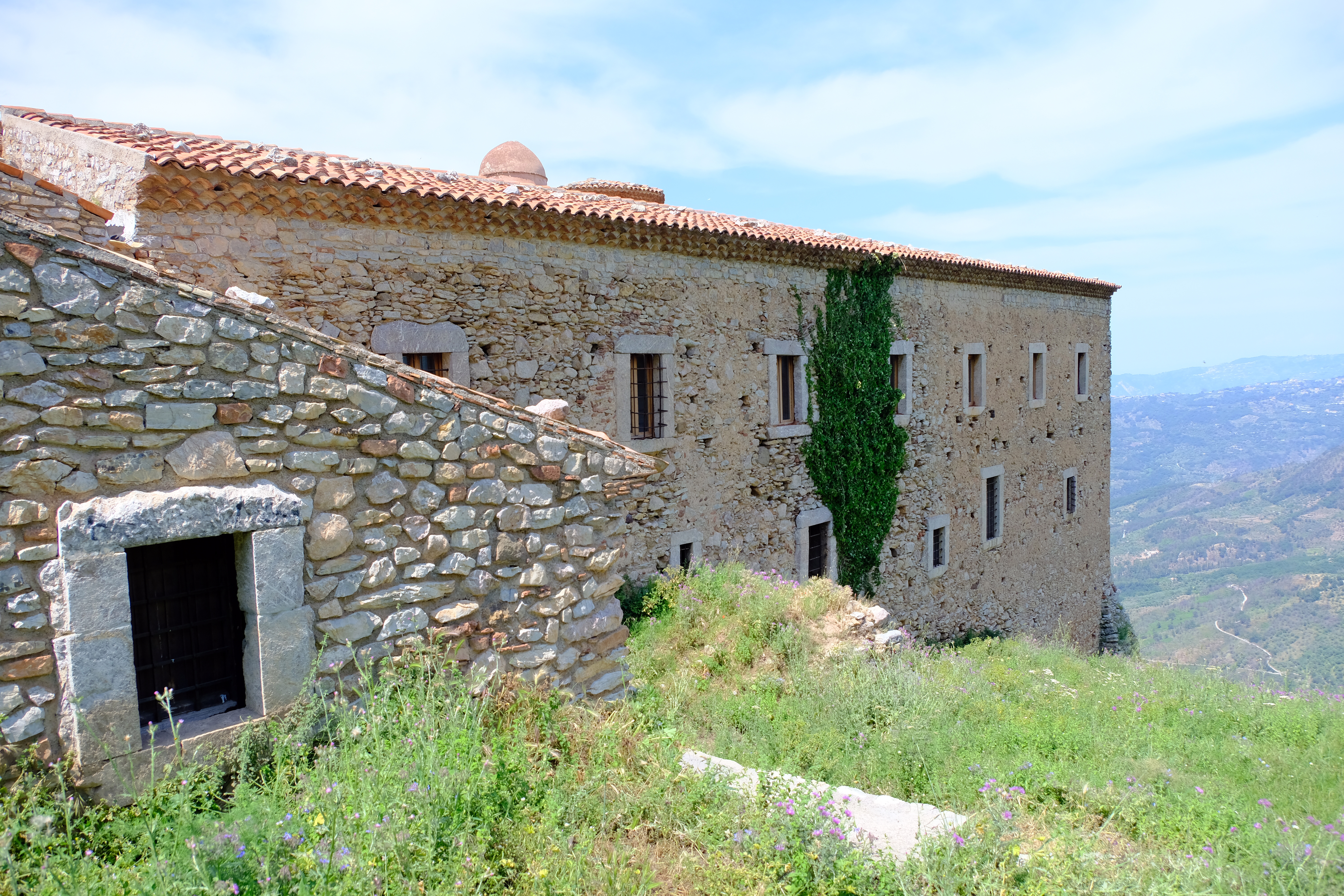 Convento di San Filippo di Fragalà